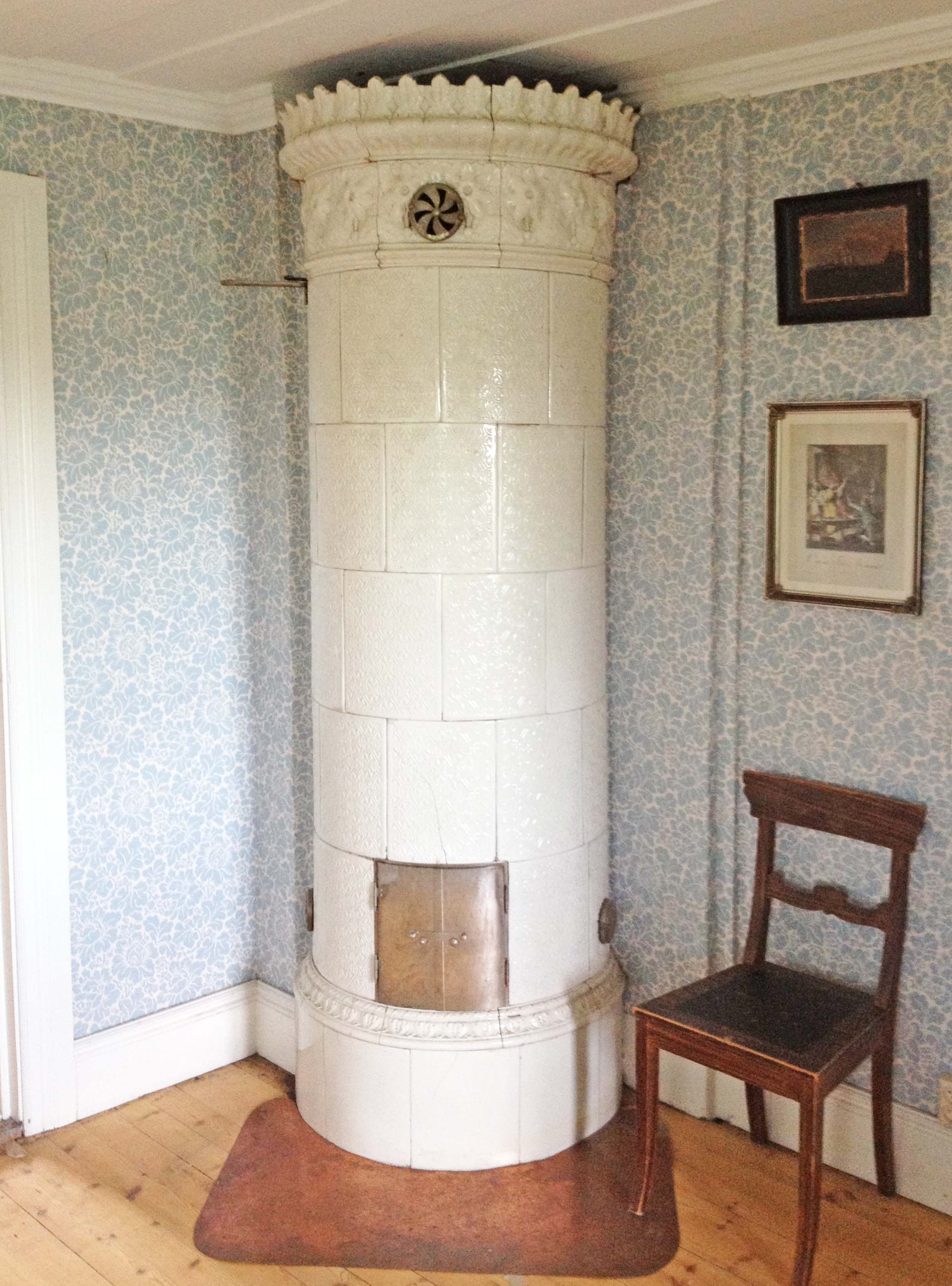 Kakelugn med jugendkrön från Rörstrand, ca 1900.